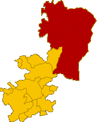 Mappa del territorio dei paesi etnei